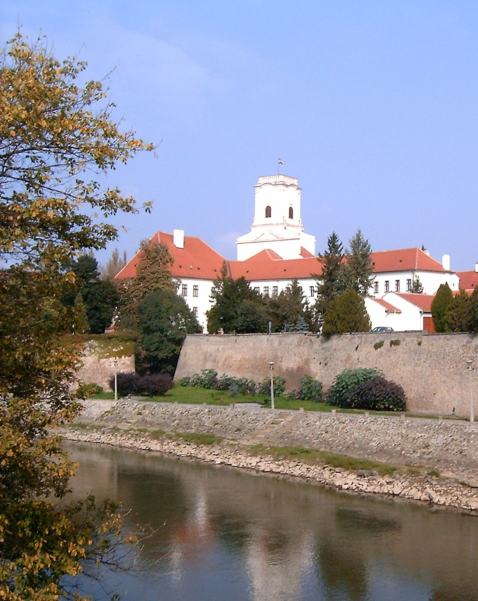 A Győri Püspökvár, saját kép